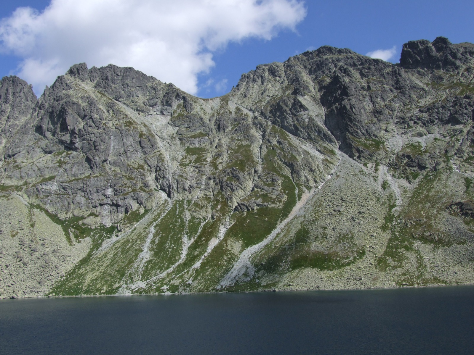 Od lewej:Wielki Mięguszowiecki, Pośredni Mięguszowiecki, Przełęcz pod Chłopkiem, Czarny Mięguszowiecki